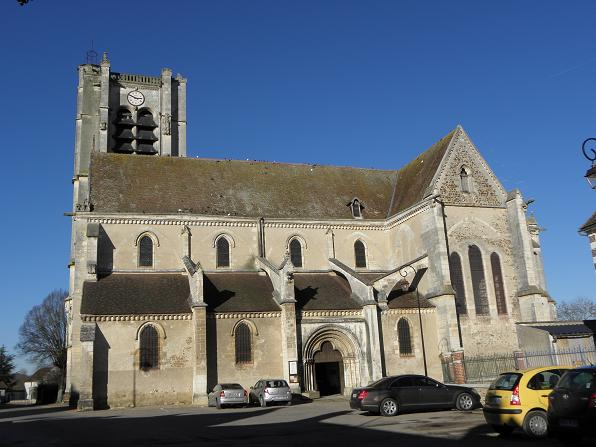 Collégiale Saint-Pierre-et-Saint-Paul d'Appoigny (89).